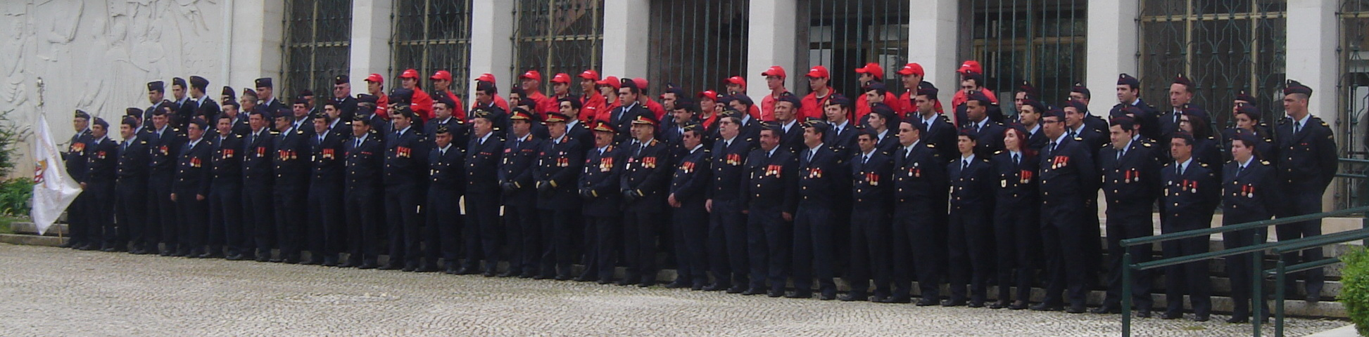 Bombeiros de Soure nas comemorações do 25 de Abril